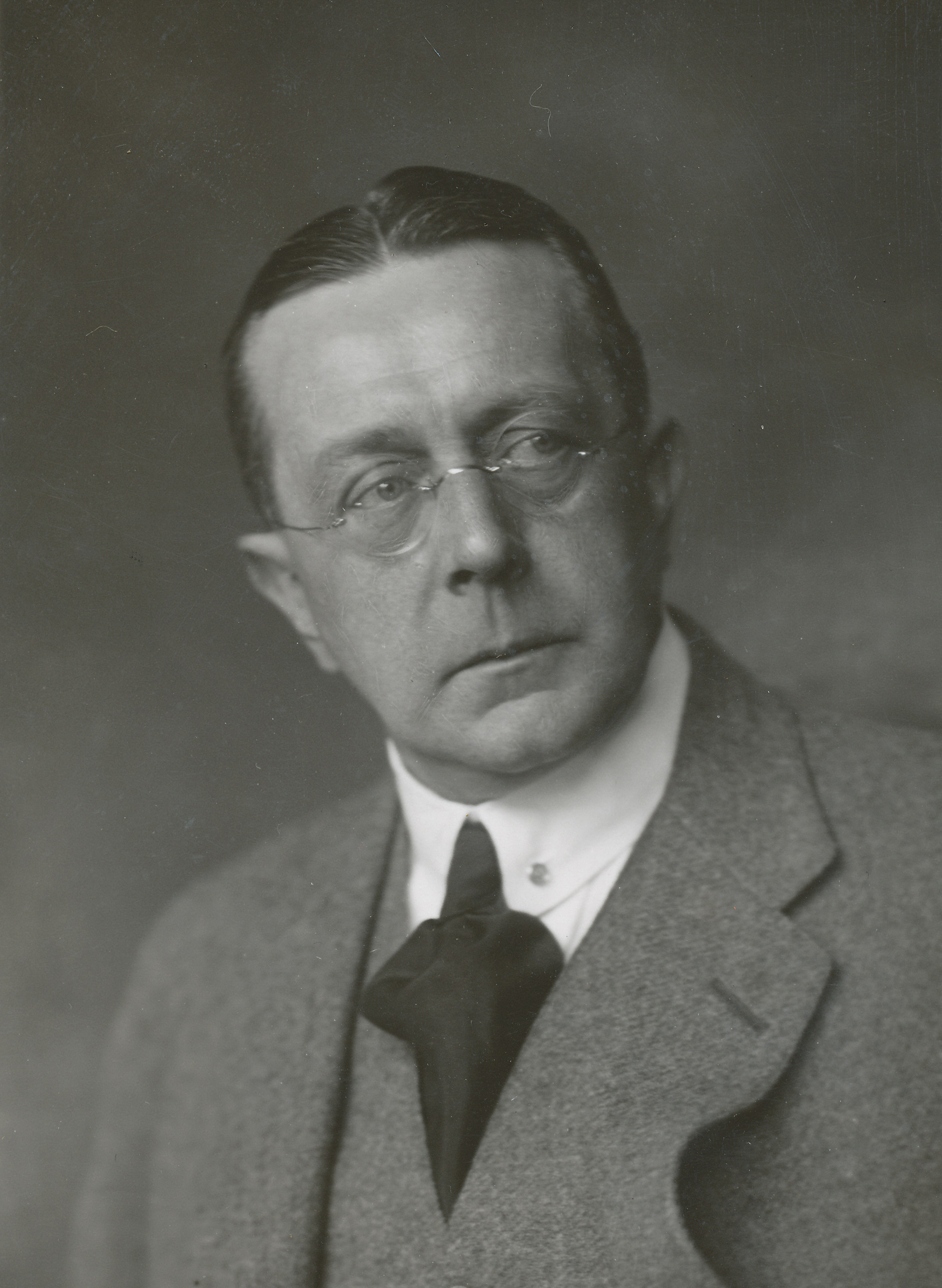 Christen Gran Bøgh (1876–1955), overrettssakfører.